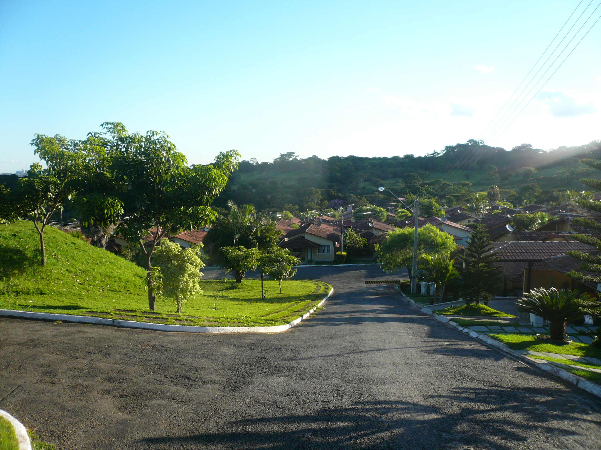 Condomínio Monte Verde, Goiânia, Goiás.